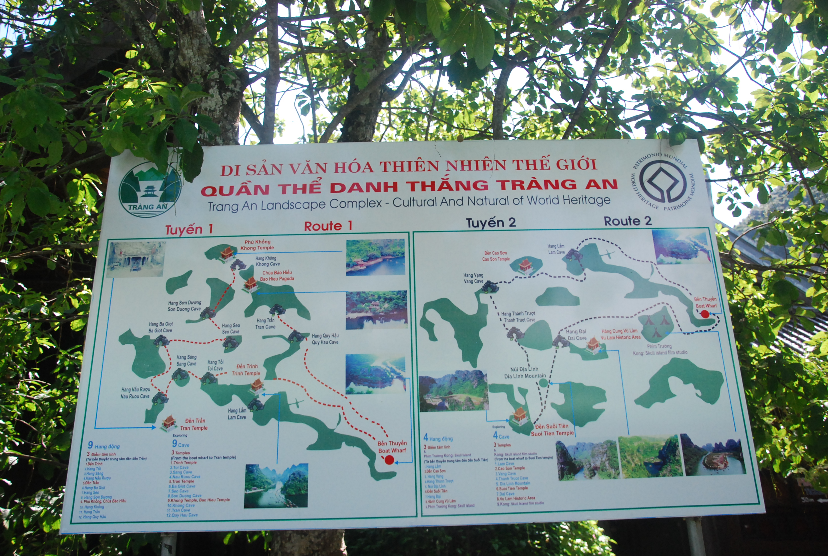 Sơ đồ tuyến thăm quan Phong cảnh khu du lịch sinh thái Tràng An ở Ninh Bình